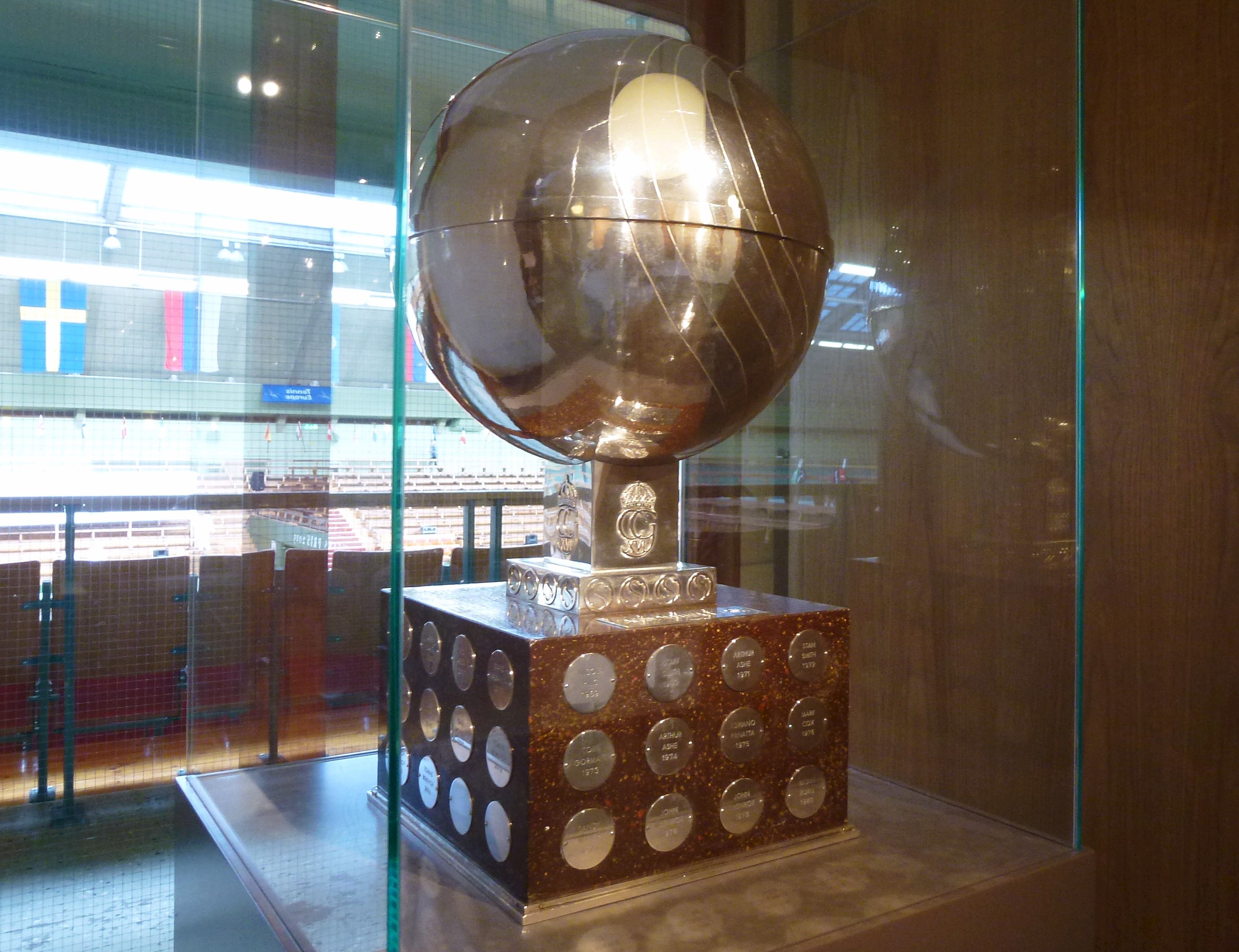 Kungliga Tennishallen, Stockholm Open - Swedish Royal Trophy